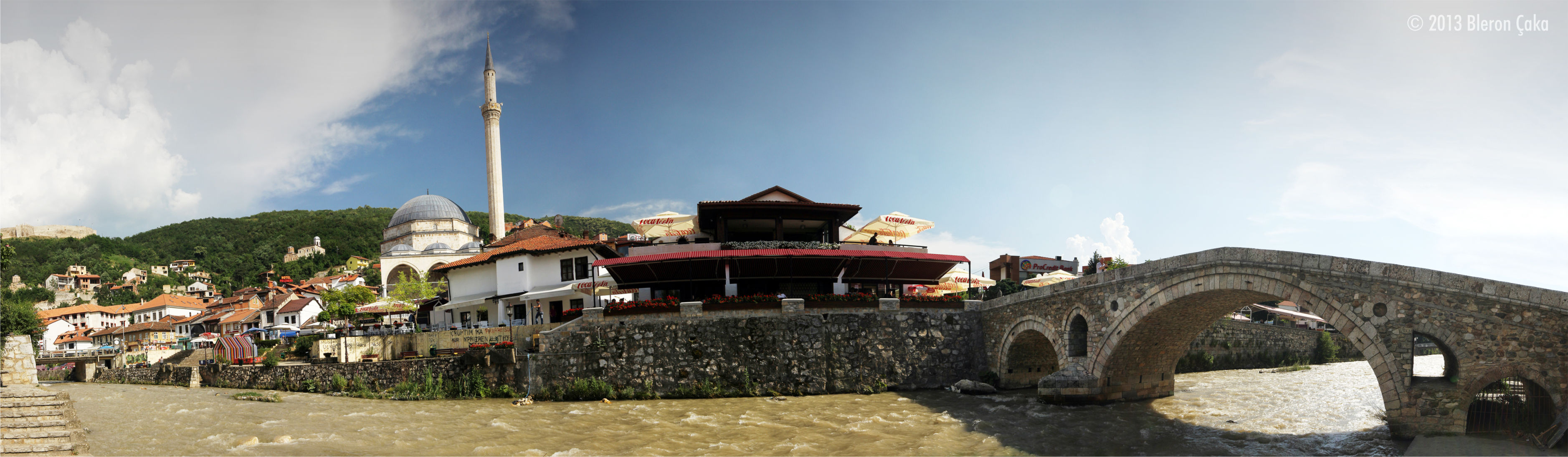 Ura e vjetër e gurit në Prizren